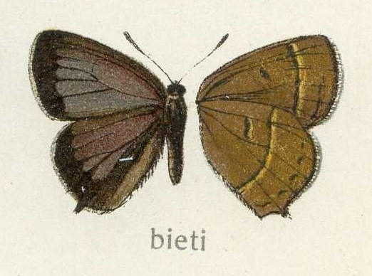 Esakiozephyrus bieti, Lycaenidae